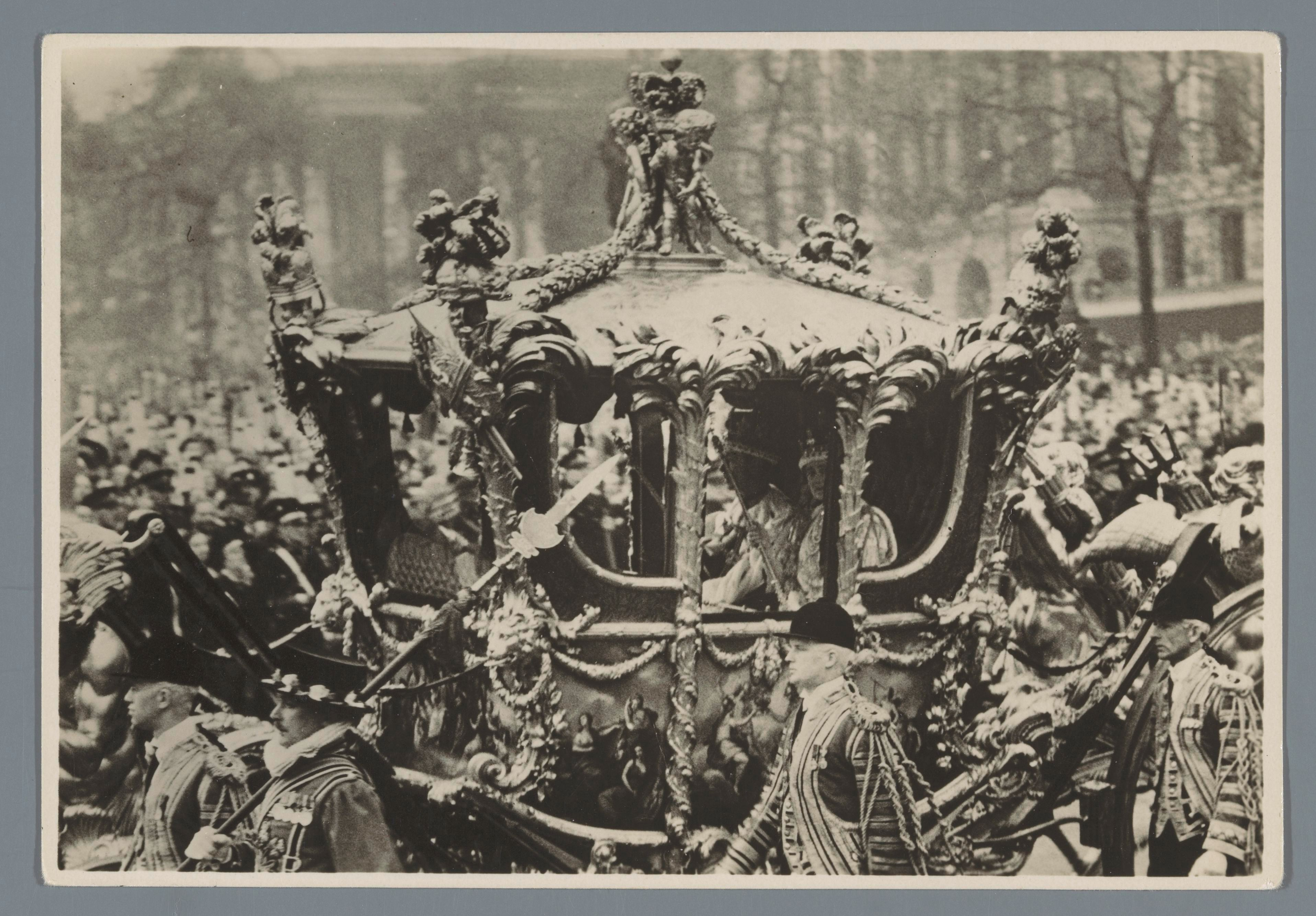 IdentificatieTitel(s): Koning George VI van het Verenigd Koninkrijk en koningin Elizabeth in een koets na hun kroning te Westminster AbbeyObjecttype: foto prentbriefkaart Objectnummer: RP-F-F21113Opschriften / Merken: opschrift, verso, gedrukt: ‘Het gekroonde Engelsche Koningspaar terugkeerende van Westminster Abbey, na Hun kroning op 12 Mei 1937.’VervaardigingVervaardiger: fotograaf: anoniemPlaats vervaardiging: LondenDatering: 12-mei-1937Materiaal: fotopapier Techniek: ontwikkelgelatinezilverdrukAfmetingen: foto: h 100 mm × b 148 mmOnderwerpWat: coronation of a rulerruler, sovereignfour-wheeled, animal-drawn vehicle, e.g.: cab, carriage, coachWie: George VI (koning van het Verenigd Koninkrijk)Elizabeth Bowes-LyonVerwerving en rechtenVerwerving: overdracht van beheer 1994Copyright: Publiek domein